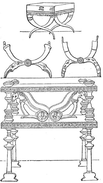 Bron: , art. Sella (1), in (ed.), A Dictionary of Greek and Roman Antiquities, Londen, 1870, p. 1015.